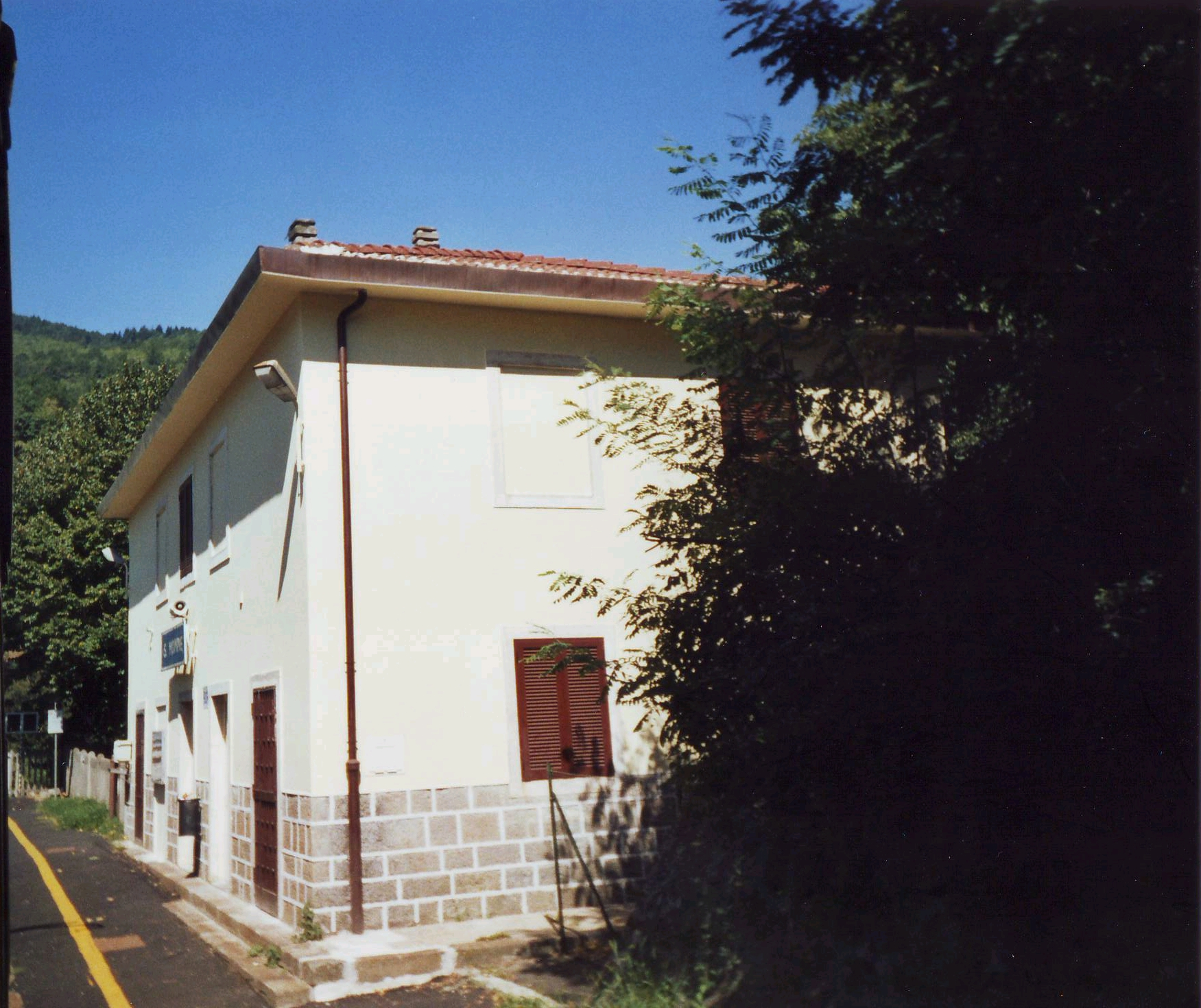 Foto della stazione di San Mommè